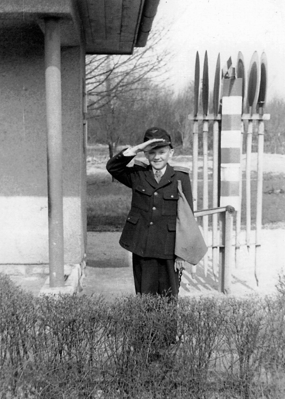 Gyermekvasút (Úttörővasút), sorompó őrhely a Csillebérc (Úttörőváros) állomás közelében. Location: Hungary, Budapest XII. Tags: railway, barrier, Budapest, Children's railway, pioneer, salute Title: Gyermekvasút (Úttörővasút), sorompó őrhely a Csillebérc (Úttörőváros) állomás közelében.